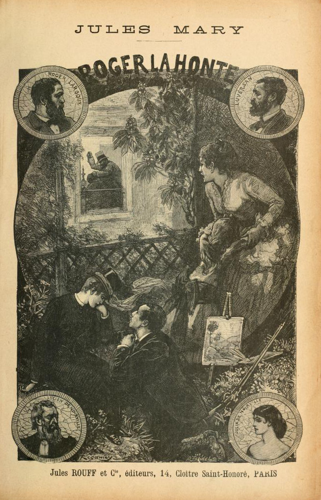 Couverture du roman Roger-la-Honte, de Jules Mary, éditions Jules Rouff, Paris, 1886